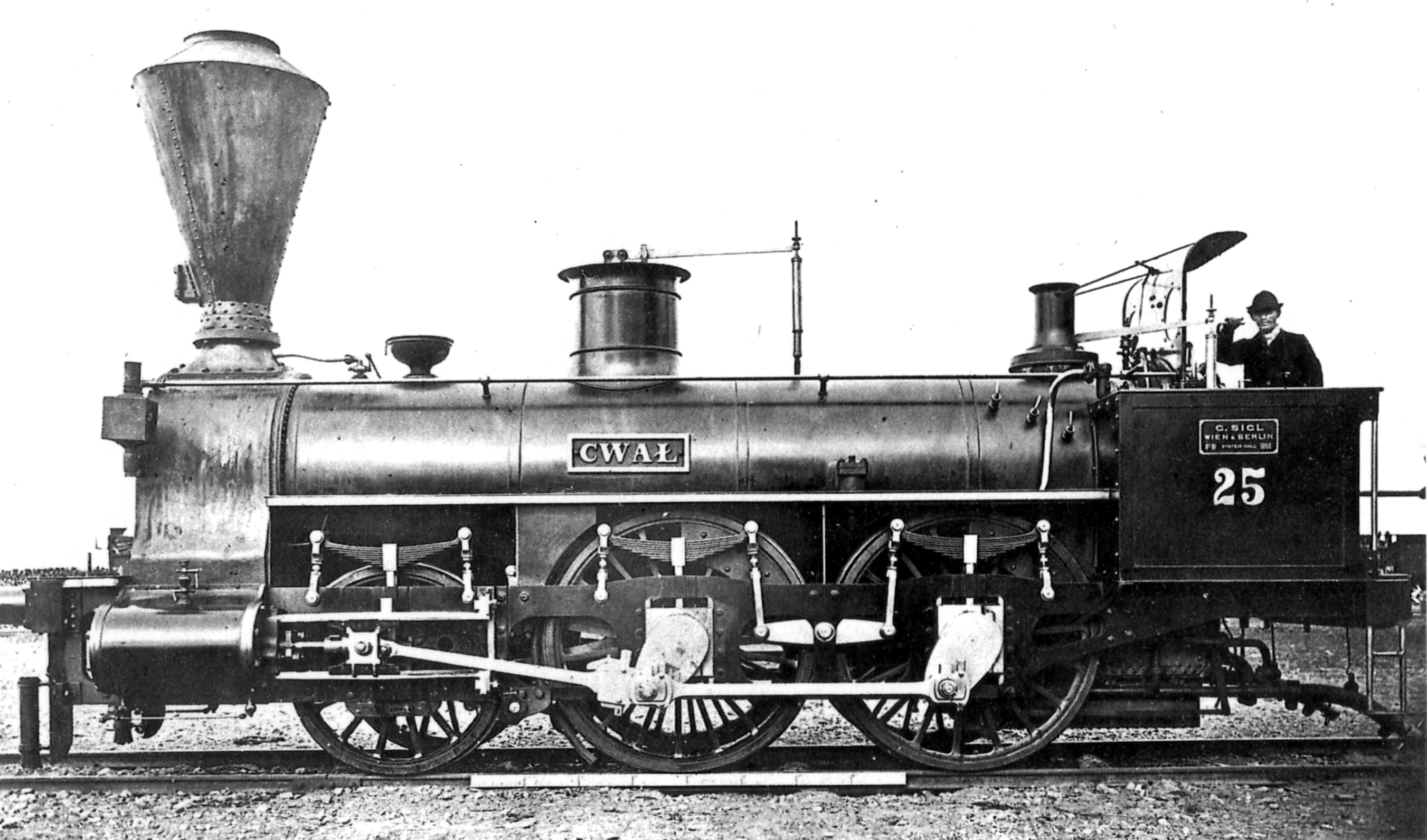 Lemberg-Czernowitz-Jassy Eisenbahn (LCJE) No. 25